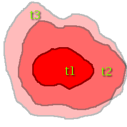 Exp Diffusion